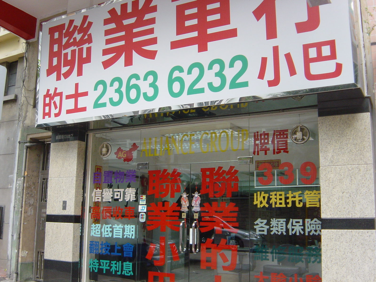 進行香港的士買賣的車行。Hong kong's taxi sale company.